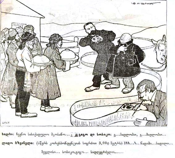 აკაკის მოგზაურობა რაჭა-ლიჩხუმში (გადმოღებული სინემატოგრაფიდან)